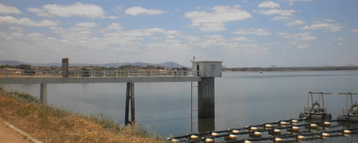 Açude Público Dr. Pedro Diógenes Fernandes (Açude Pau dos Ferros, 2011) em Pau dos Ferros, Rio Grande do Norte (Brasil).